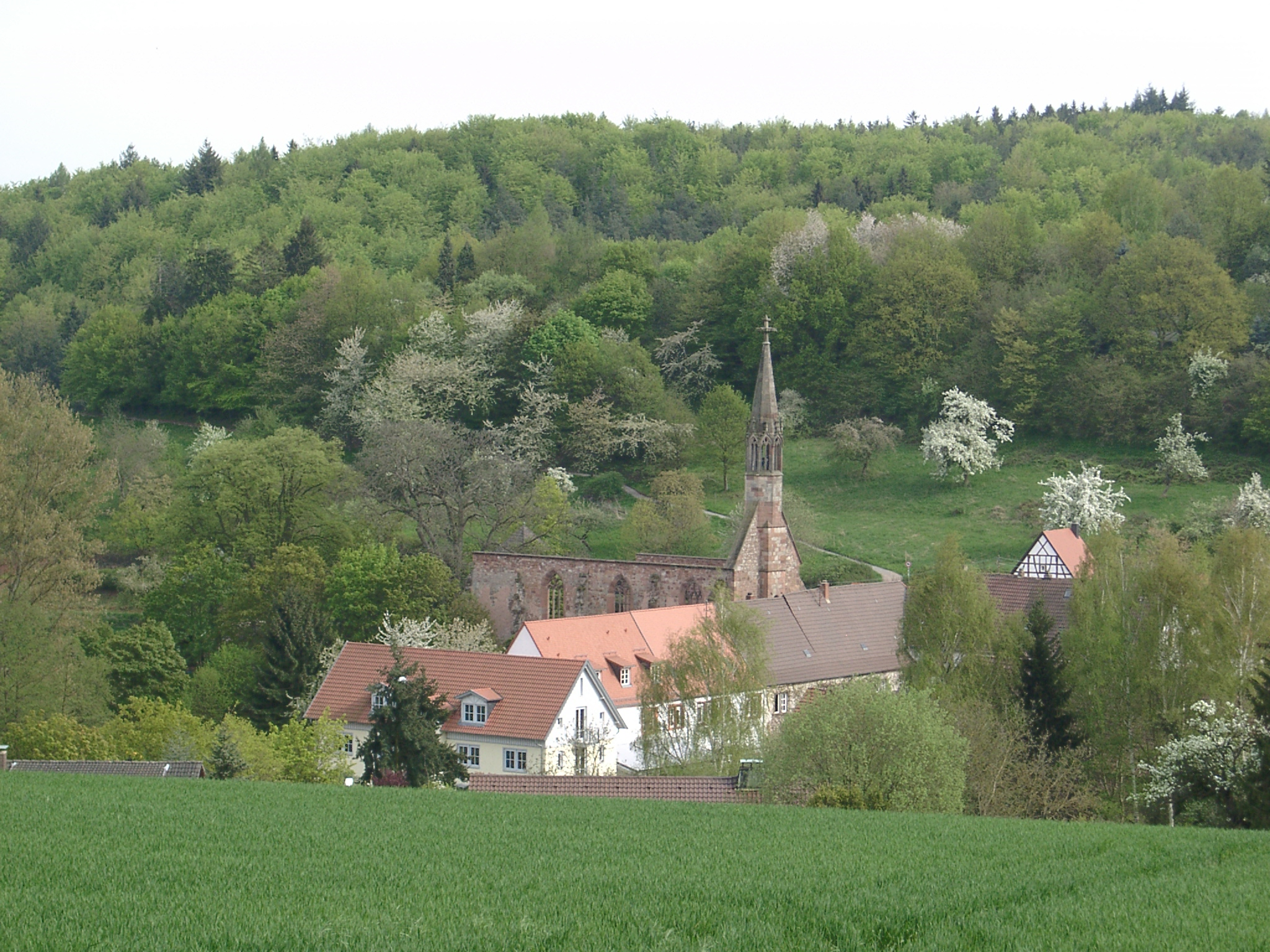 Kloster Rosenthal bei Göllheim (Pfalz) Creator: Klaus Graf